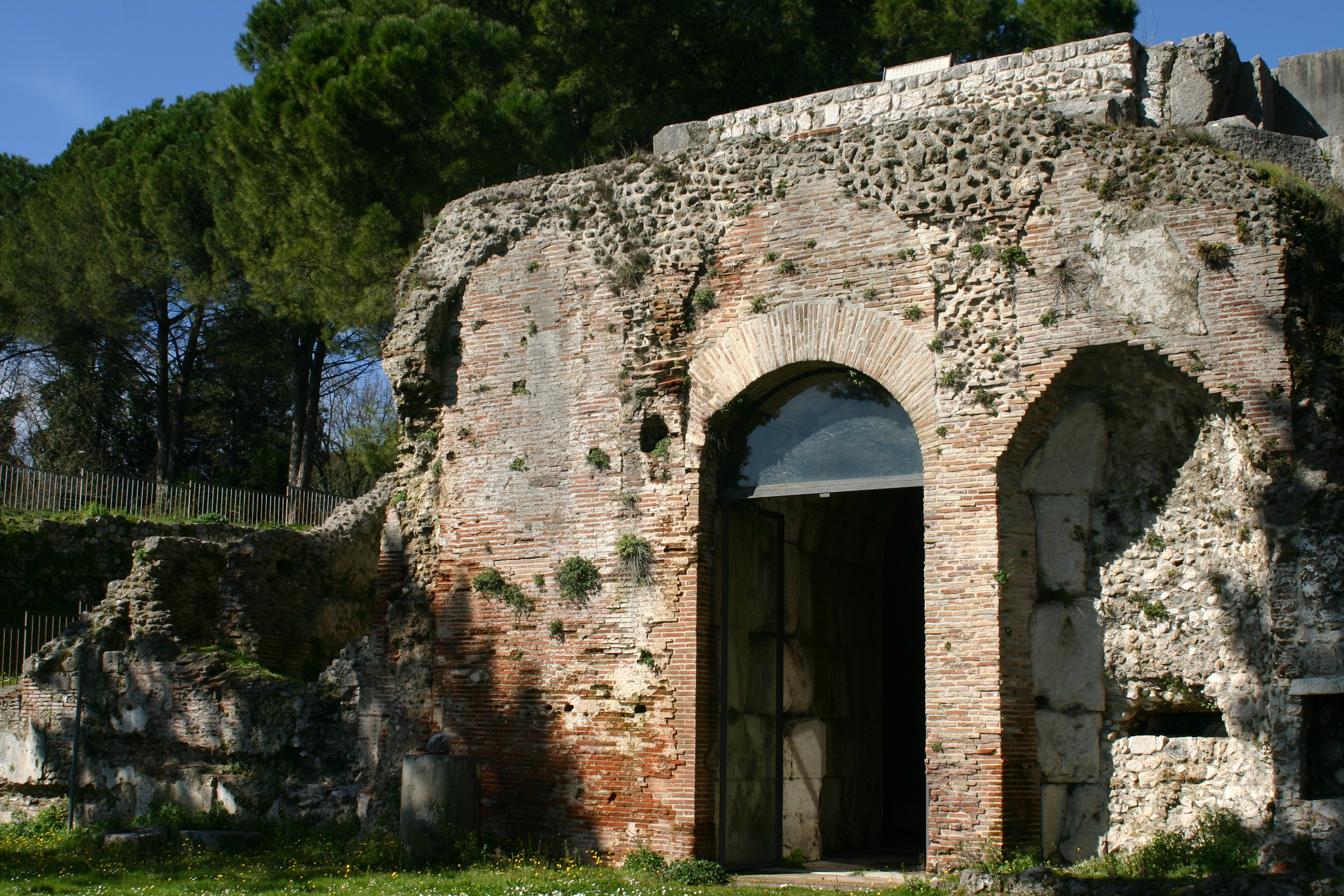 Mausoleo di Ummidia Quadratilla della città di Casinum (metà del I secolo d. C.)